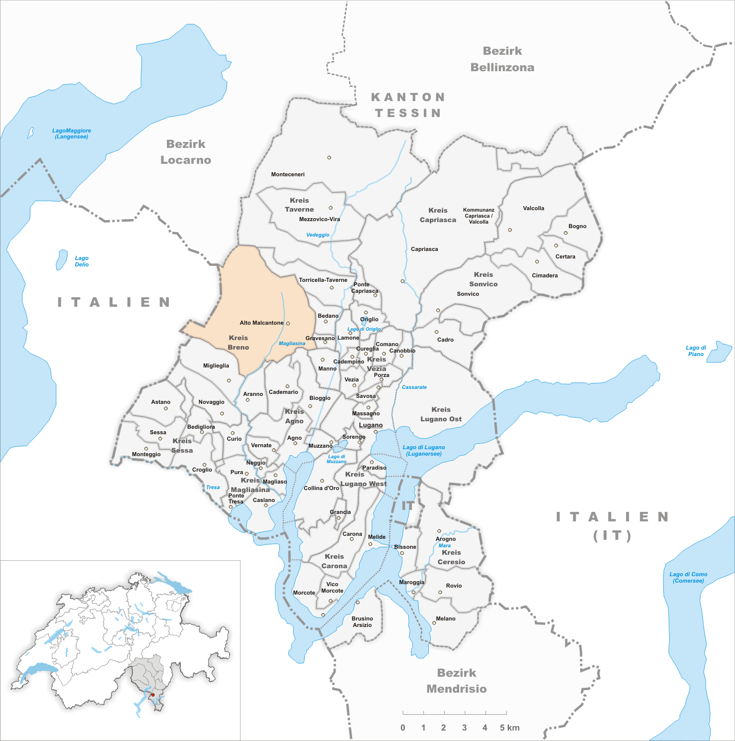 Municipality Alto Malcantone